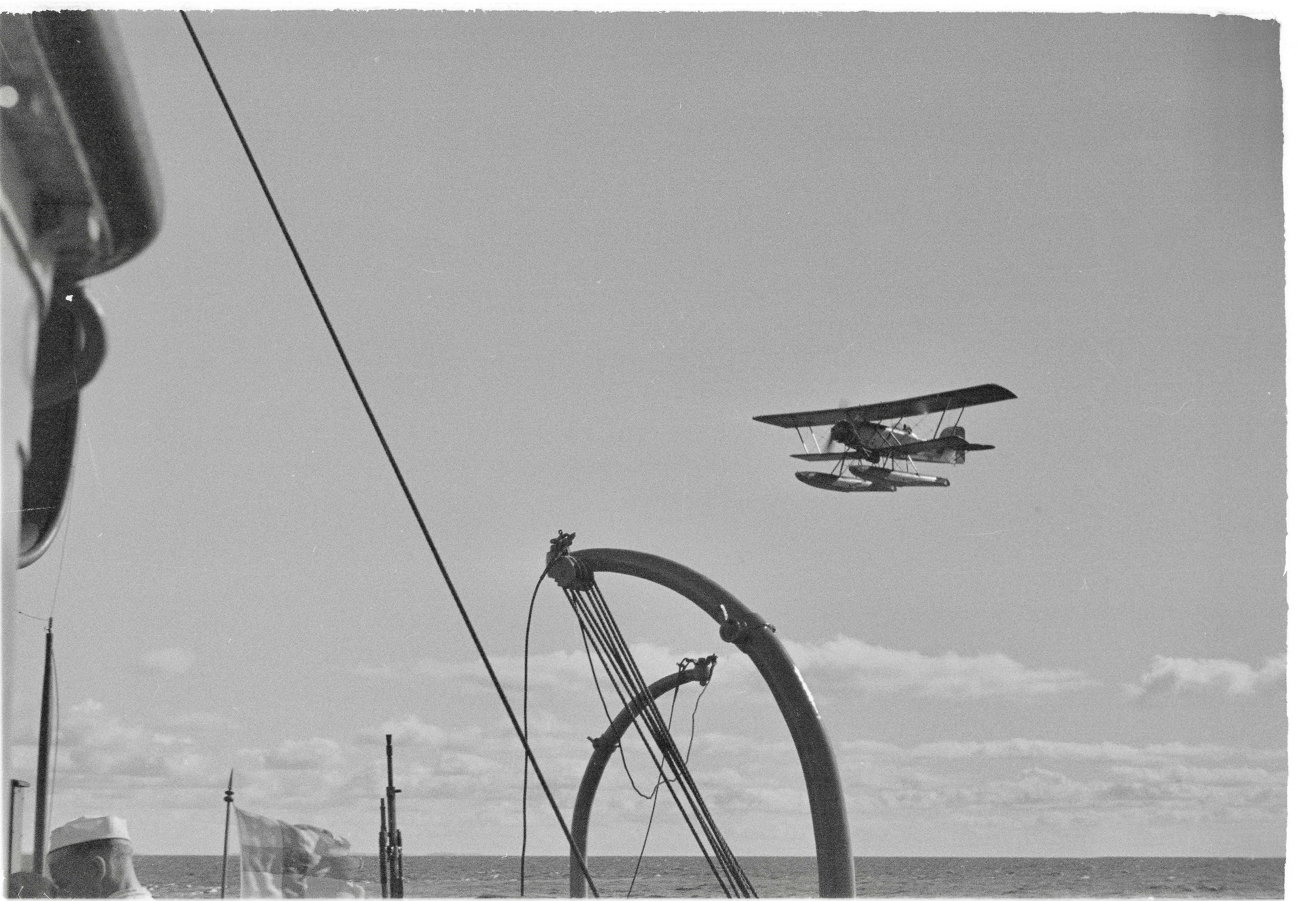 Med konvoj över Ålands hav: Eskortplanet söker U-båten.